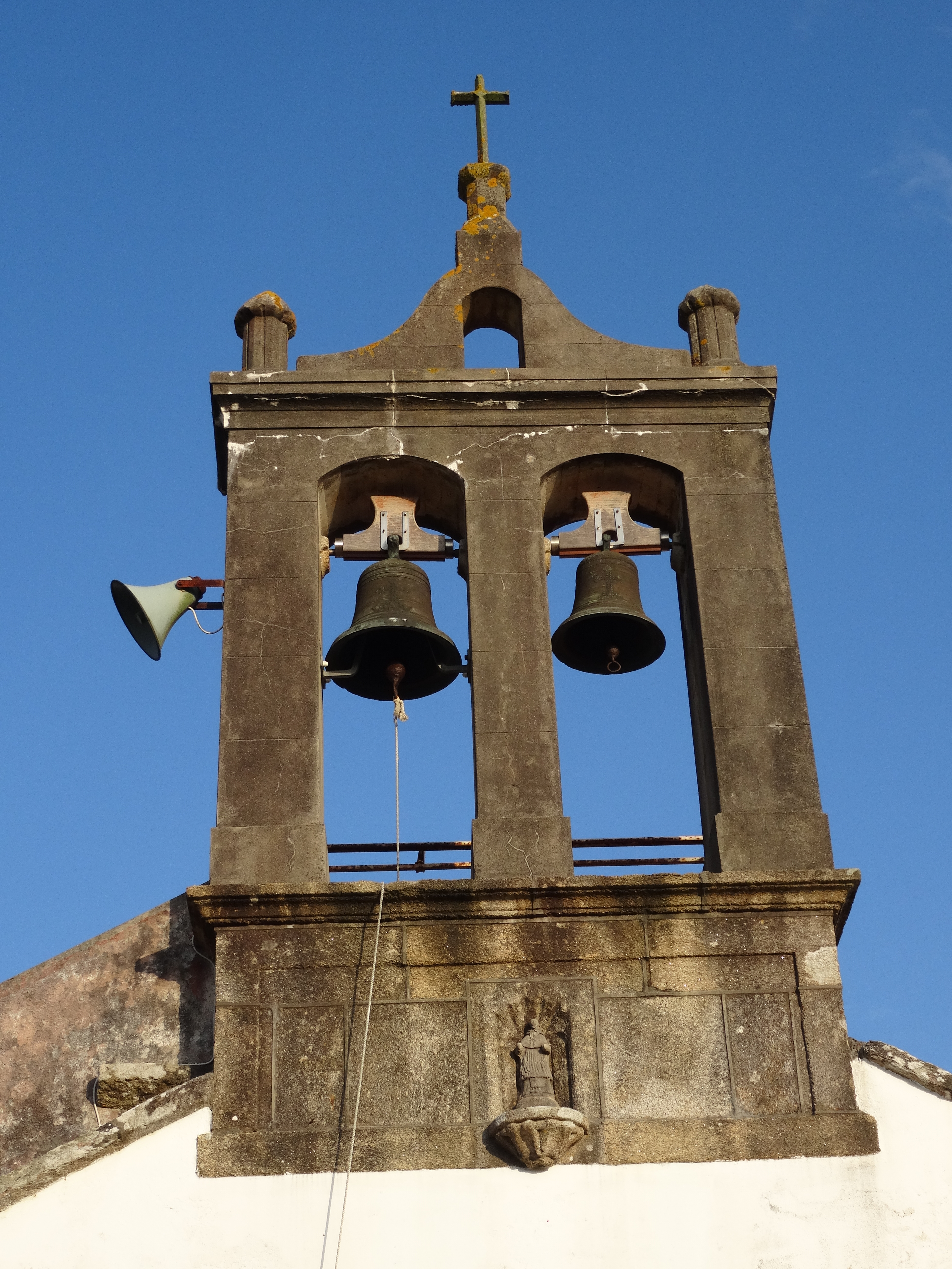 Ver título.